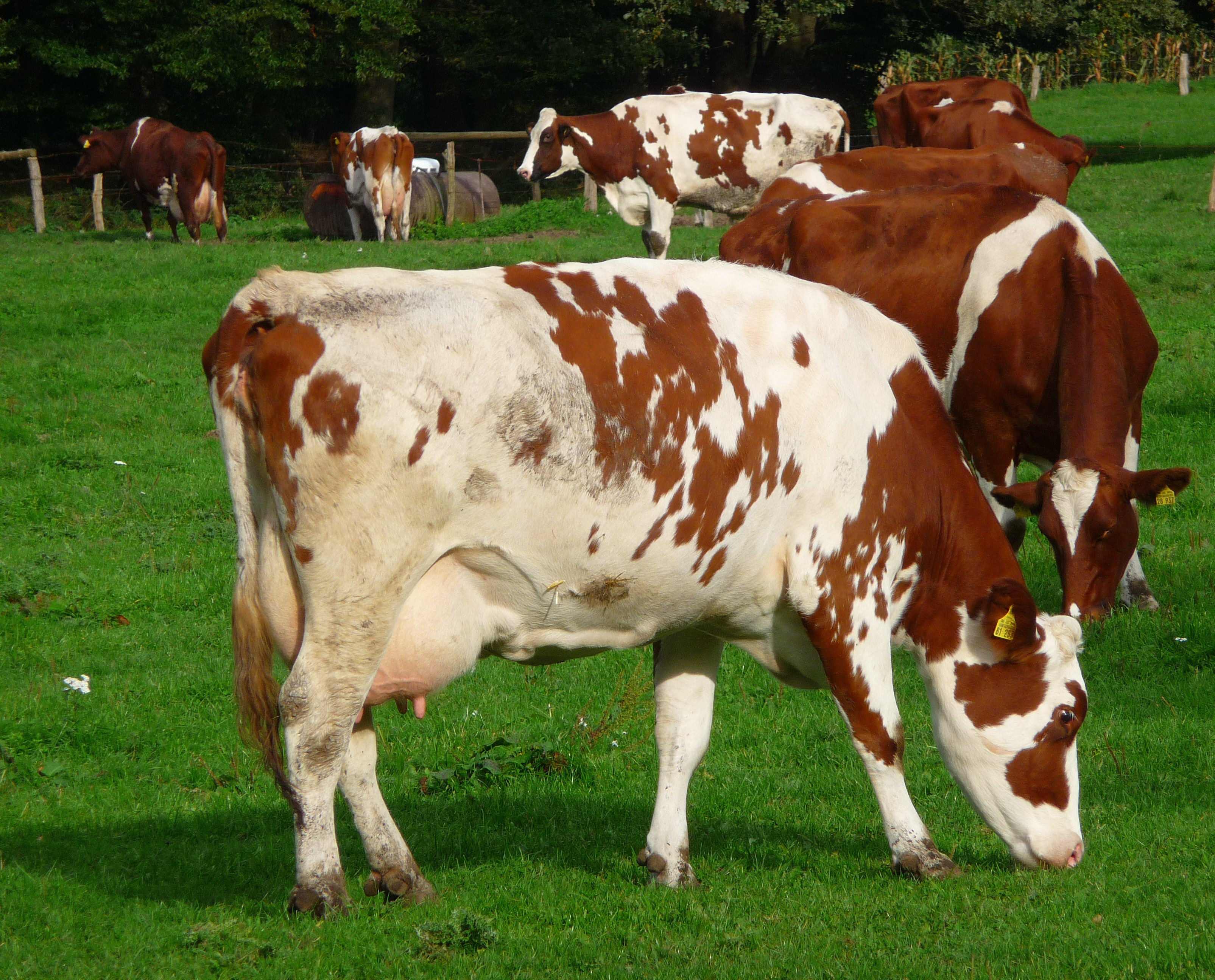 Weidende Milchkühe in Gescher (Nordrhein-Westfalen, Deutschland)